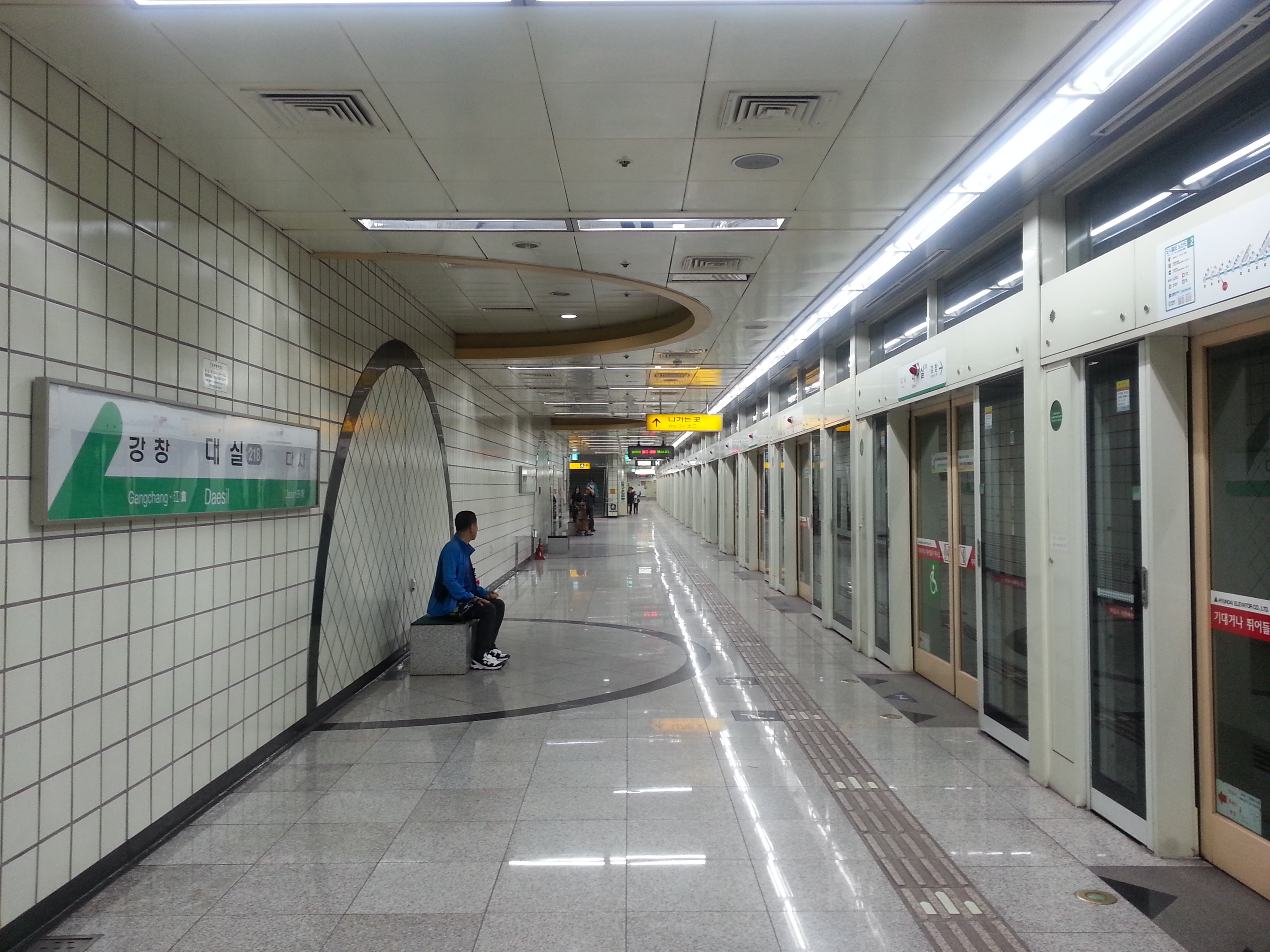 대구 도시철도 2호선 대실역 영남대 방면 승강장